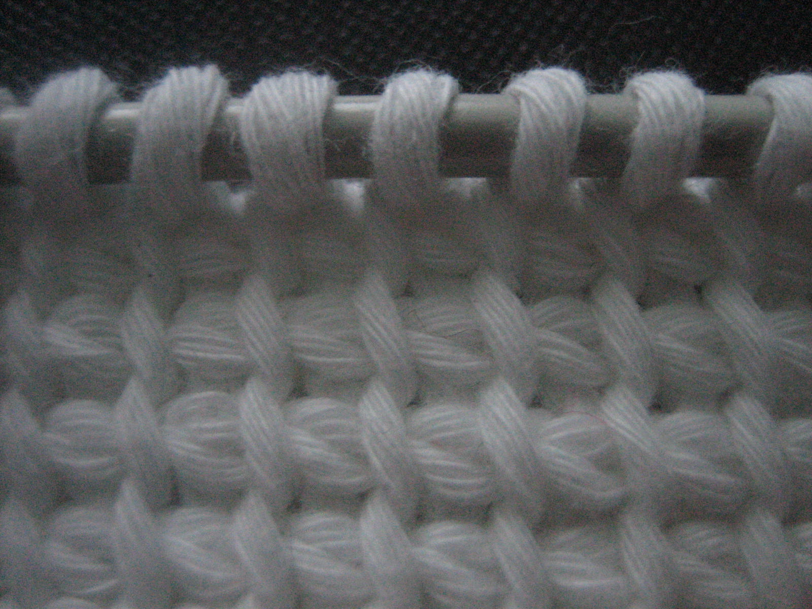 Kuva koukkuamisesta